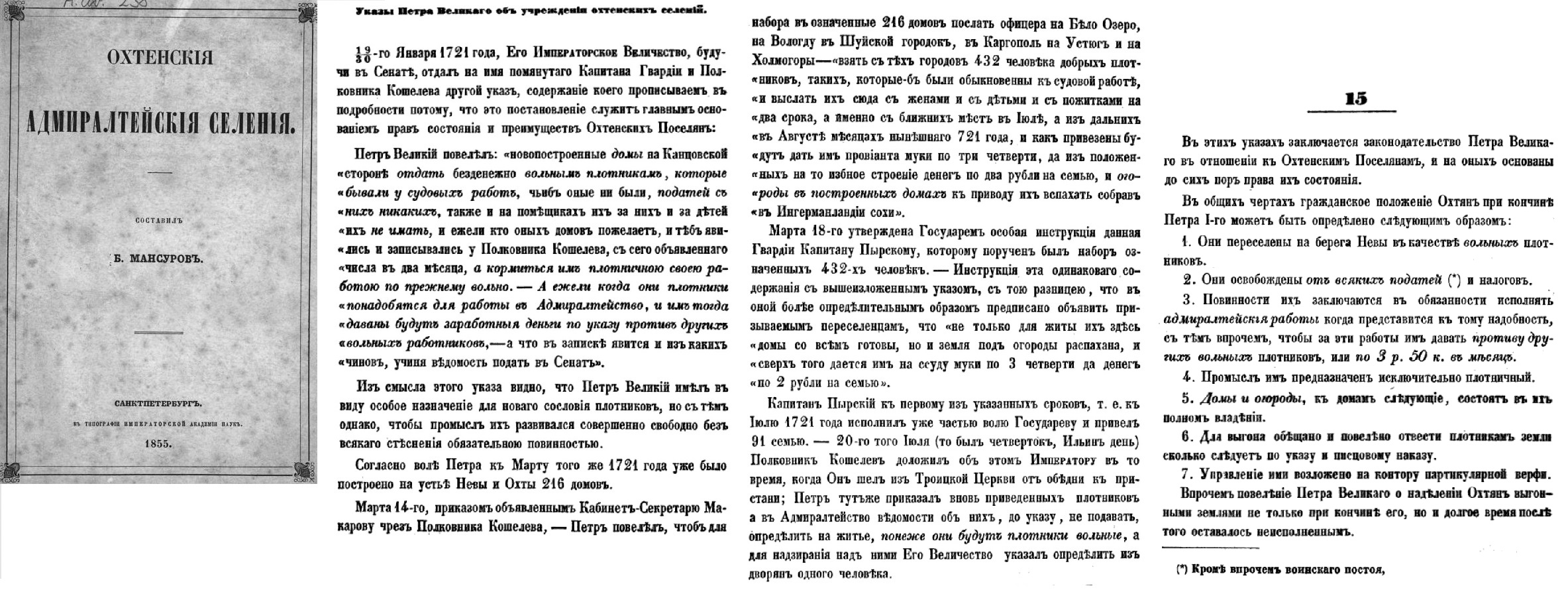 Копия страниц из оригинала книги